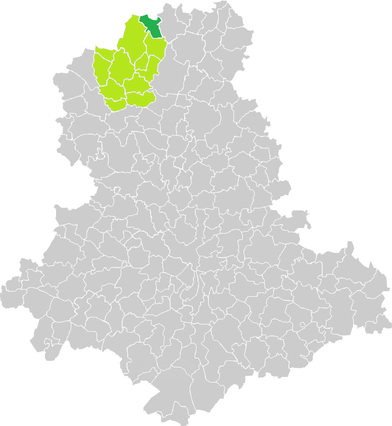 Carte de situation de la commune de Verneuil-Moustiers (en vert foncé) dans le votre Canton (en vert clair) sur une carte des communes de la Haute-Vienne